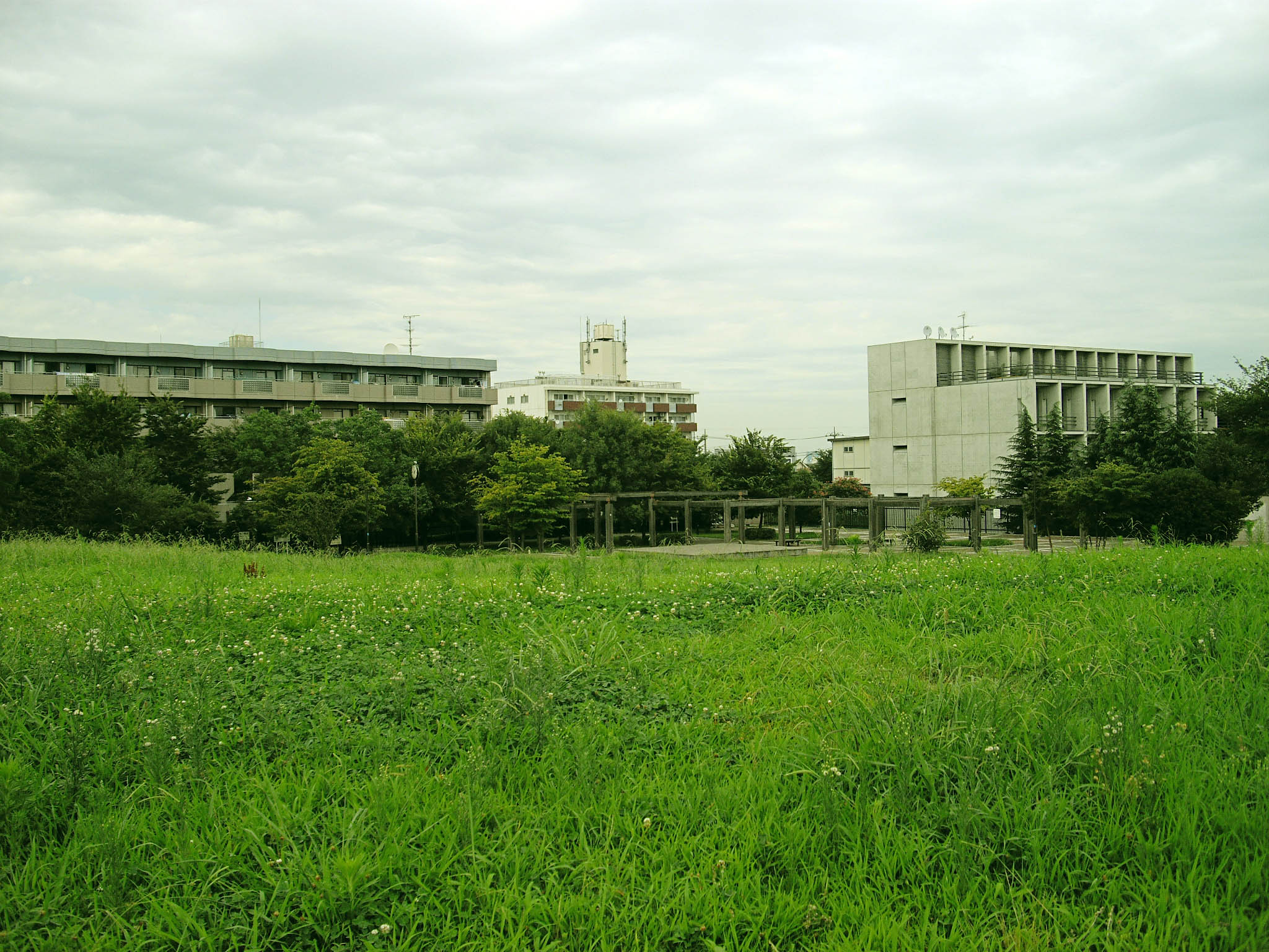 世田谷区立ぽかぽか広場